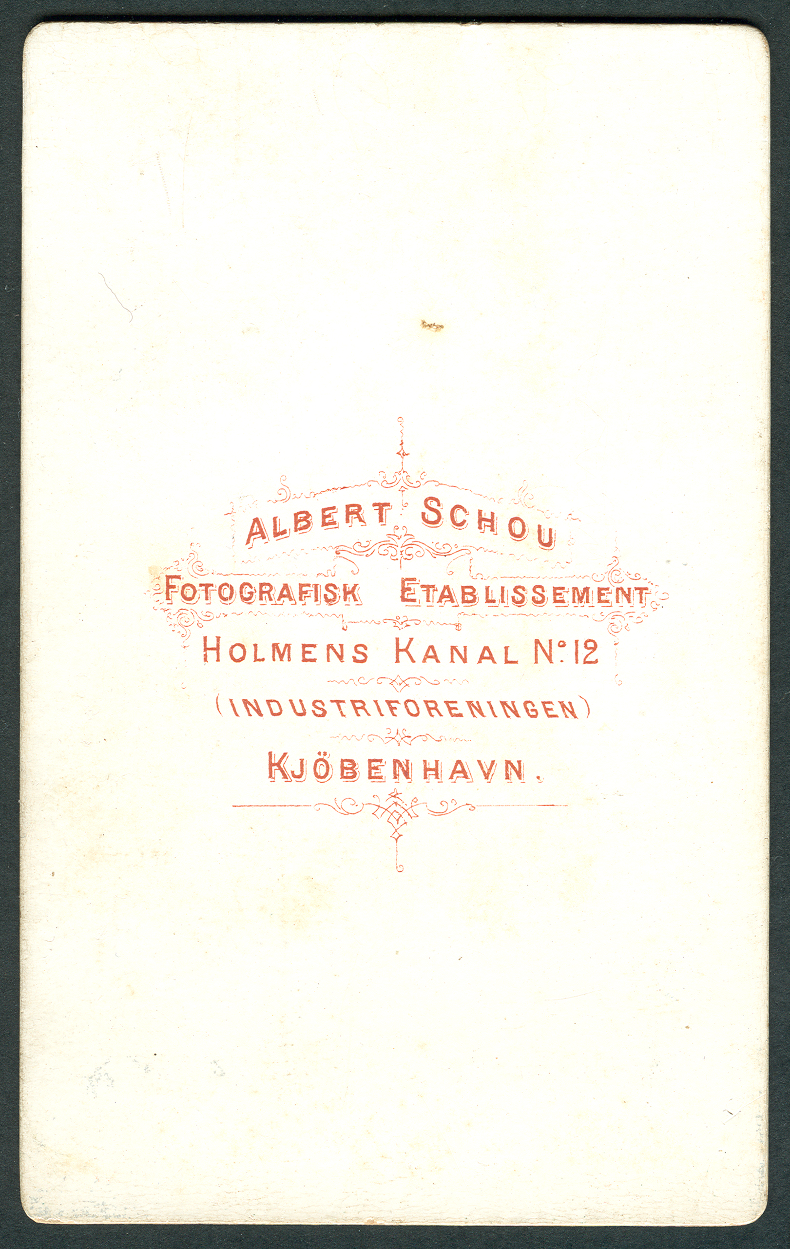 Adress-Seite des Kartons einer Carte de Visite (CDV), produziert von dem Fotografen Albert Schou' in dessen "Fotografisk Etablissement" am "Holmens Kanal No. 12", (Industrieverband) in Kopenhagen.